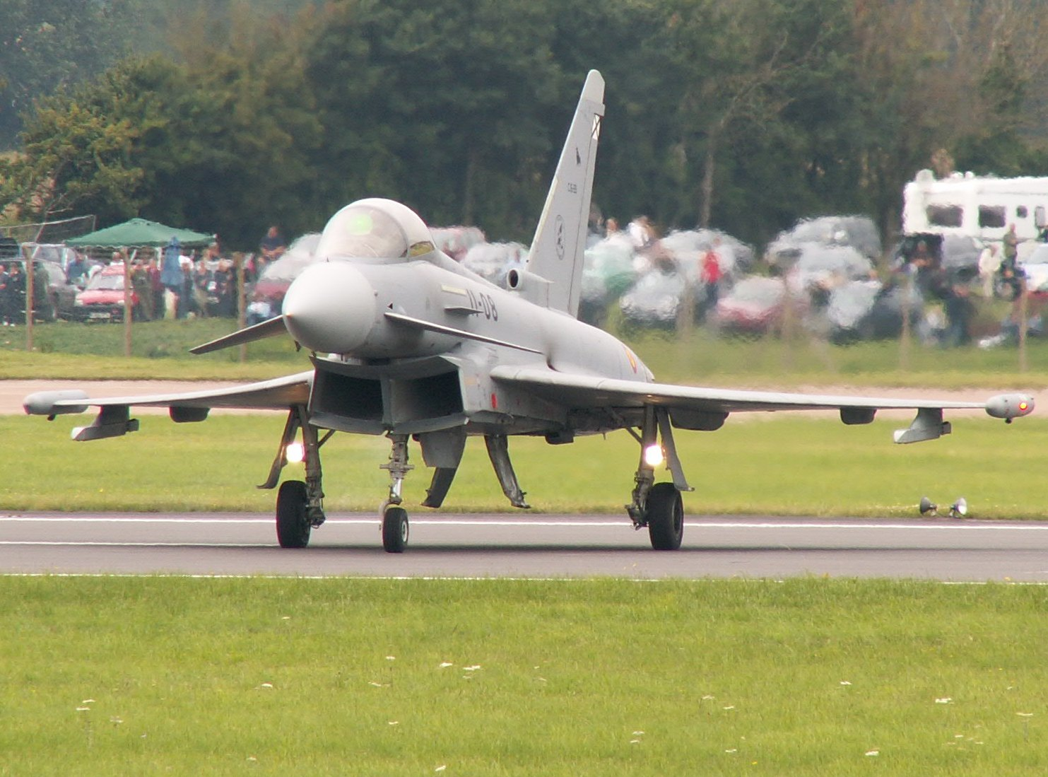 Un Eurofighter Typhoon del Ejército del Aire de España en el Royal International Air Tattoo 2007, Gloucestershire, Inglaterra. (Imagen recortada)